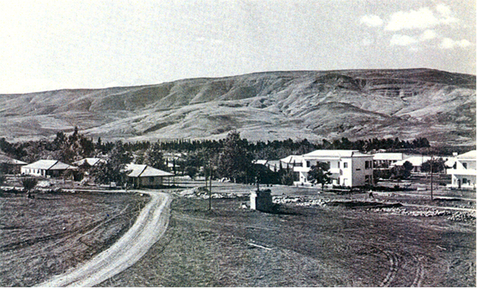 שנות ה- 40. קיבוץ אפיקים בראשיתו. ארכיון קיבוץ אפיקים